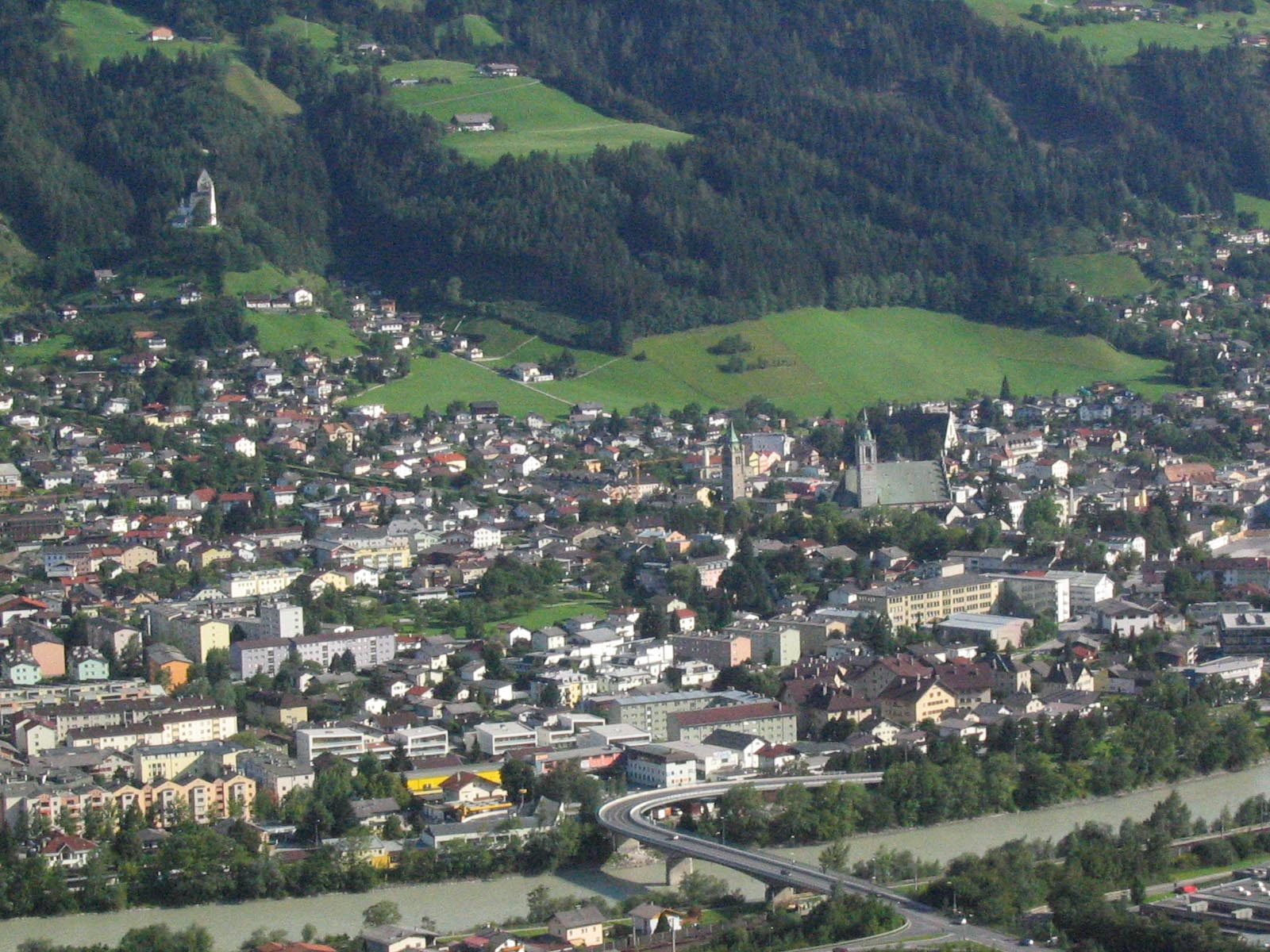 Schwaz, Tyrol